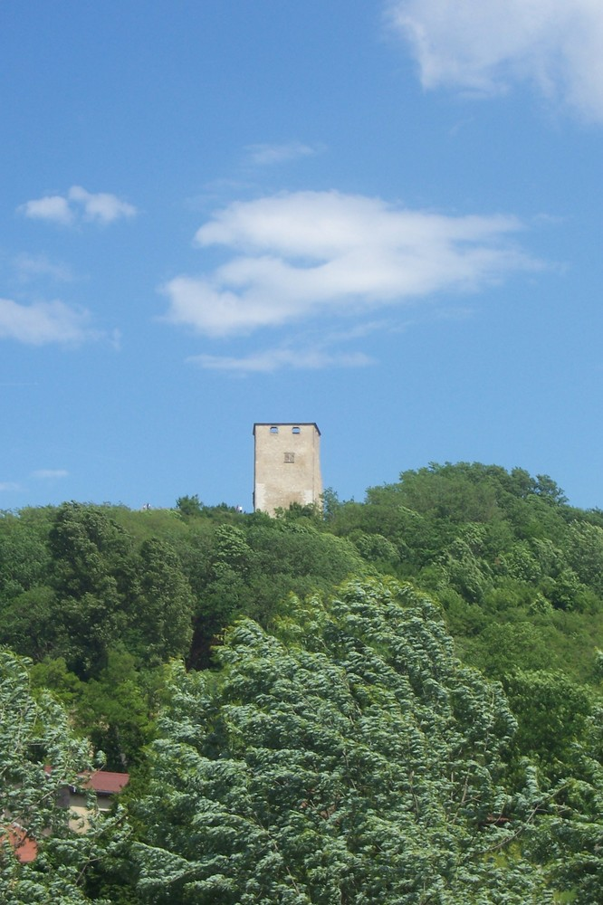 Tour de Saint Denis en Bugey